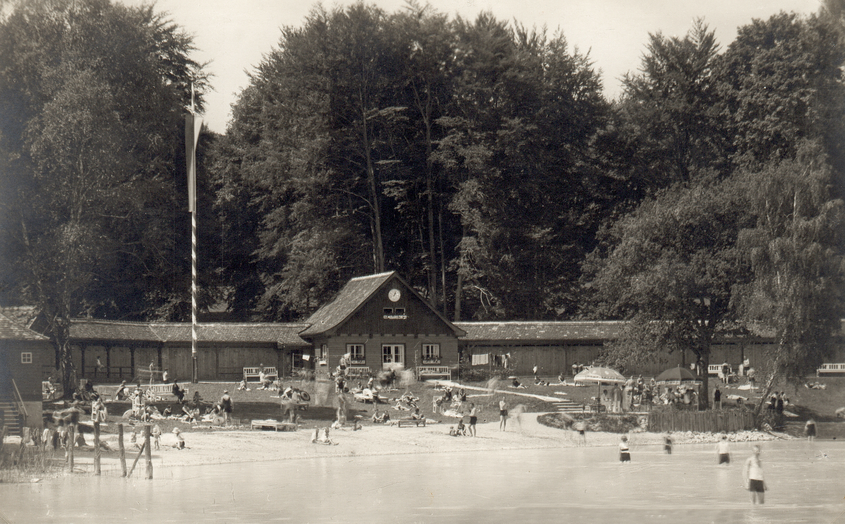 Strandbad Feldafing um 1930 Aufnahme vom See